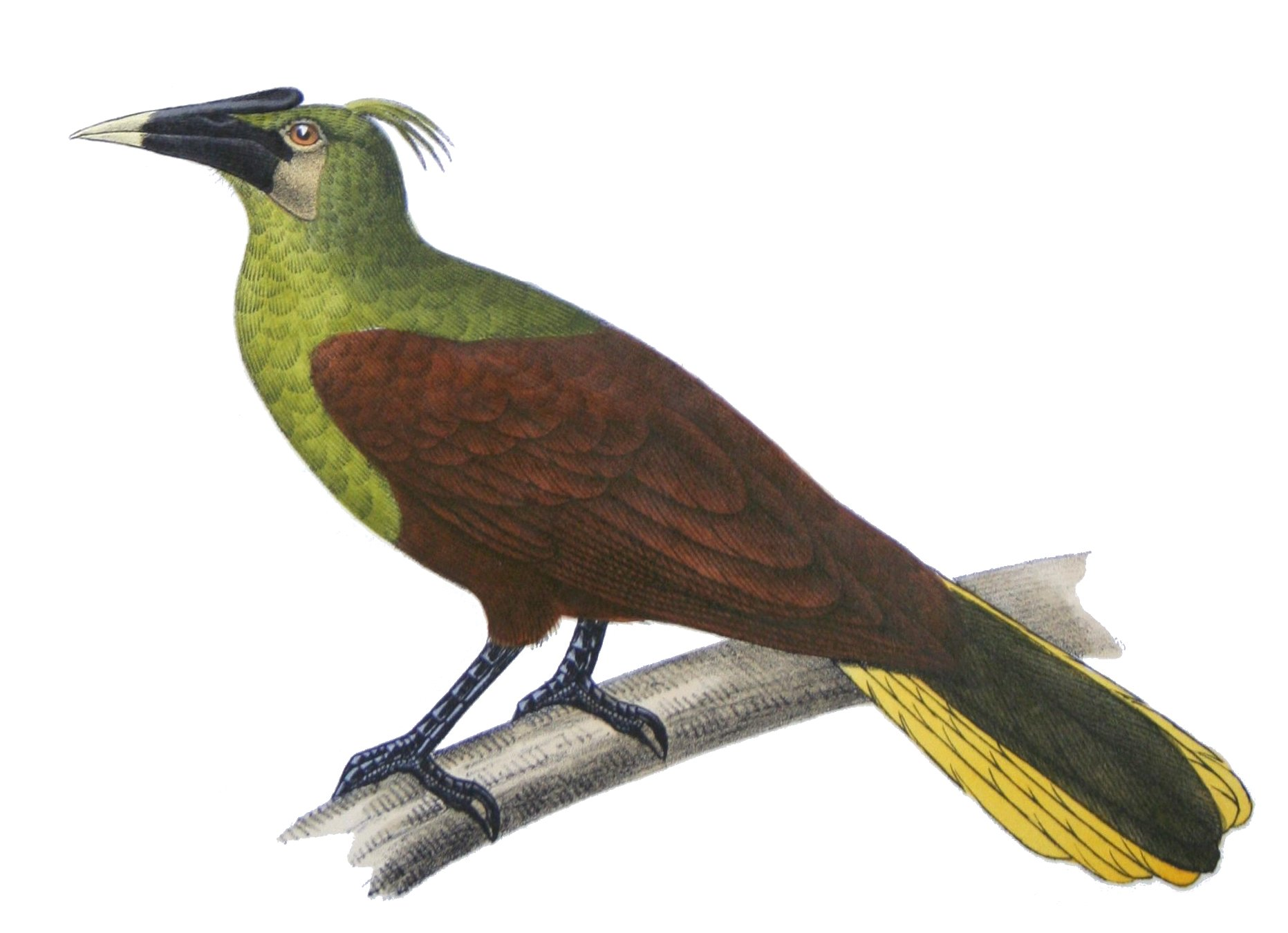 Cassicus devillei = Psarocolius (bifasciatus) yurucares / Gymnostinops (bifasciatus) yurucares (d'Orbigny & Lafresnaye, 1838)